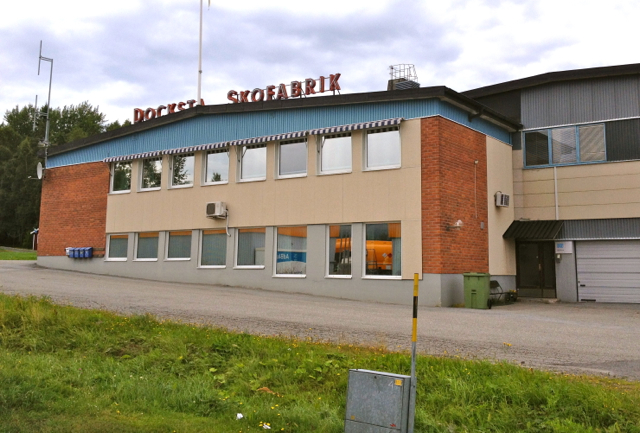 Skofabriken i Docksta, Västernorrlands län